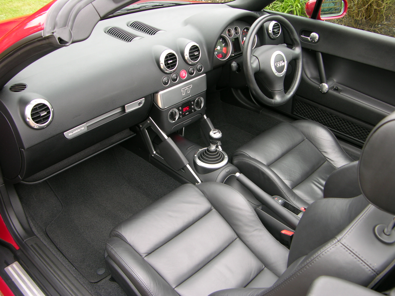 Audi TT 225 Roadster 2001 Misano Red